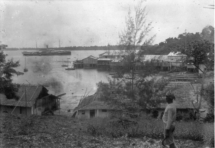 Foto. Een kampong met paalwoningen op het eiland Toeal, één van de Kai eilanden in de Molukken